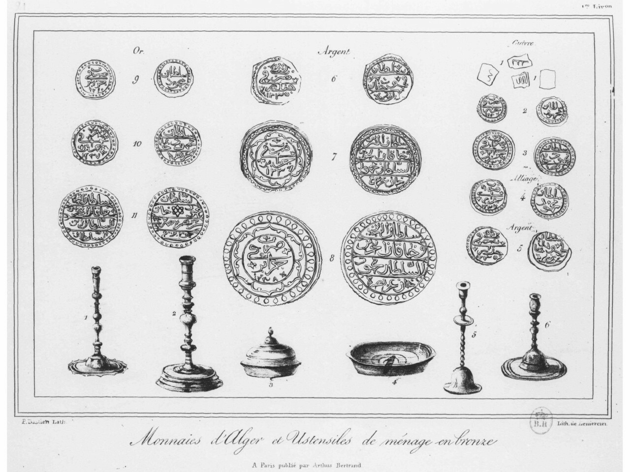 Titre : Voyage dans la régence d'Alger, ou Description du pays occupé par l'armée française en Afrique : contenant des observations sur la géographie physique, la géologie, la météorologie,... : suivies de détails sur le commerce l'agriculture, les sicences et les arts, les moeurs,.... Atlas / par M. Rozet,... Auteur : Rozet, Claude-Antoine (1798-1858) Éditeur : A. Bertrand (Paris) Date d'édition : 1833 Sujet : France -- Colonies -- Afrique Sujet : Afrique du Nord -- Descriptions et voyages -- 19e siècle Type : monographie imprimée Langue : Français Format : 3 t. et 1 atlas : carte ; in-8 et in-fol. (atlas) Format : application/pdf Droits : domaine public Identifiant : ark:/12148/bpt6k106605k Source : Bibliothèque nationale de France, département Philosophie, histoire, sciences de l'homme, 8-Lk8-36 (atlas) Relation : Notice d'ensemble : Relation : Provenance : bnf.fr